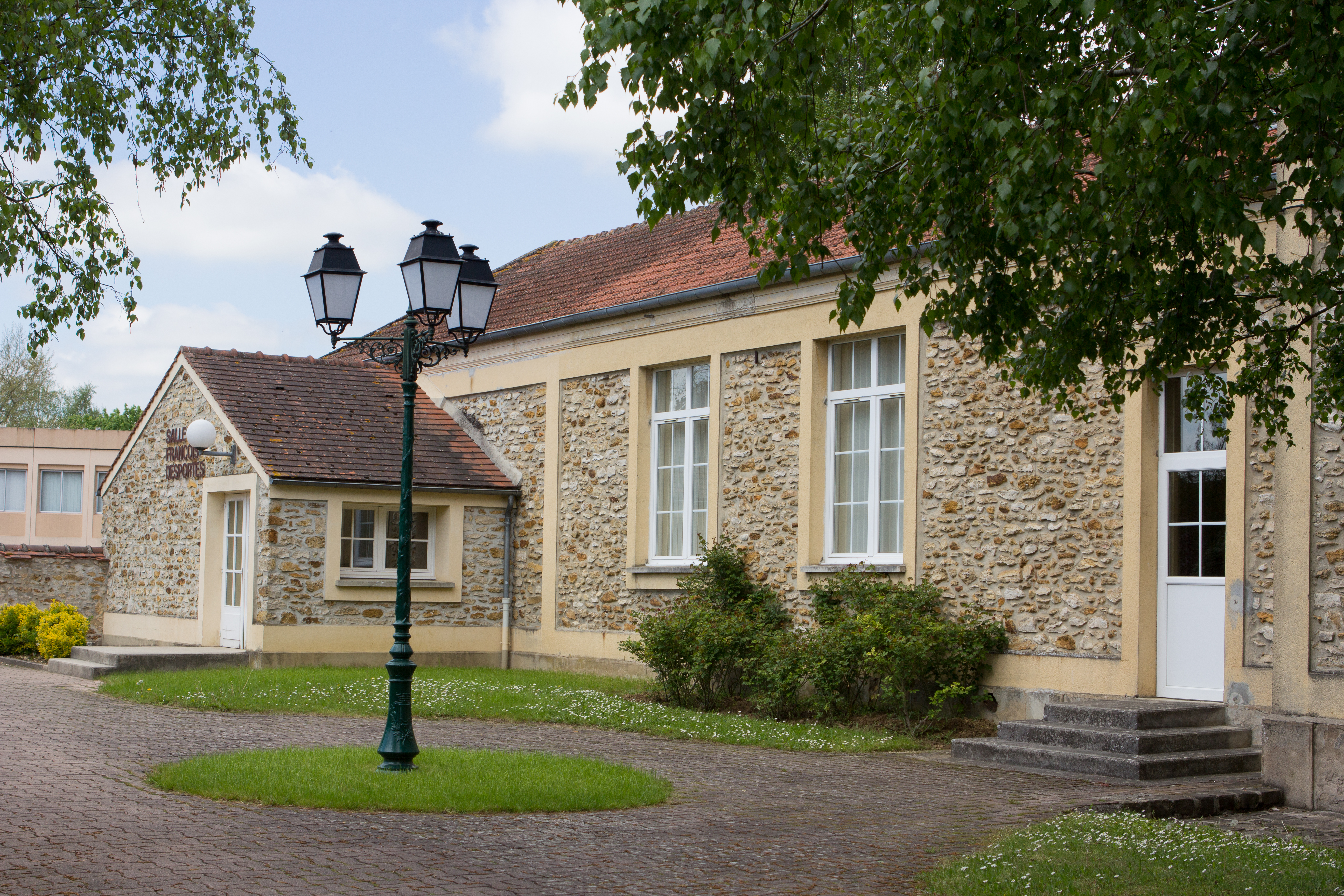 La Salle François Desportes de Chailly-en-Bière (Commune de Chailly-en-Bière, Seine-et-Marne, France)